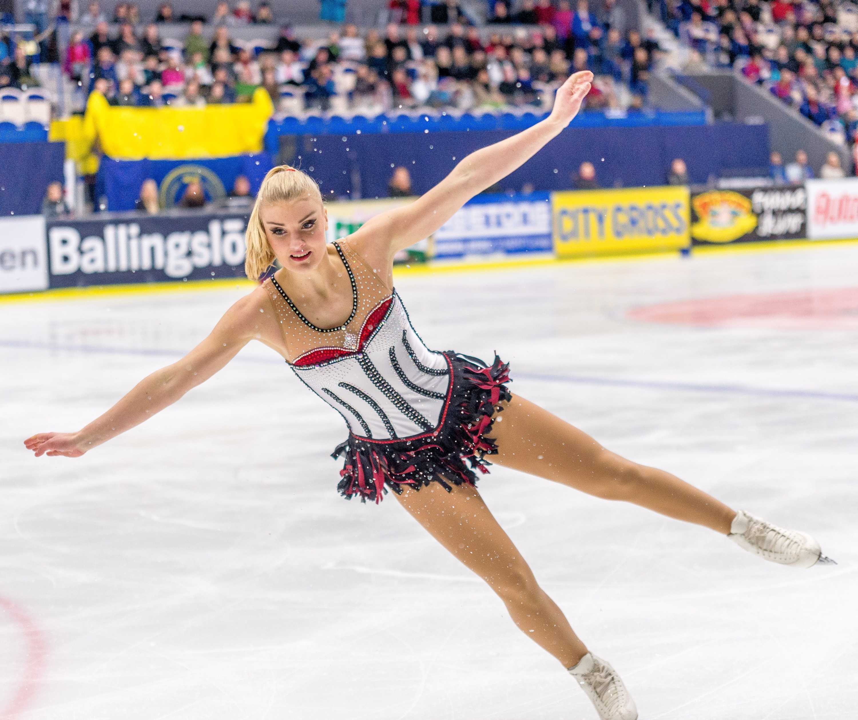 Konståkerskan Joshi Helgesson i sitt fria program under Konståknings-SM i december 2012, där hon vann sitt första SM-guld som senior.